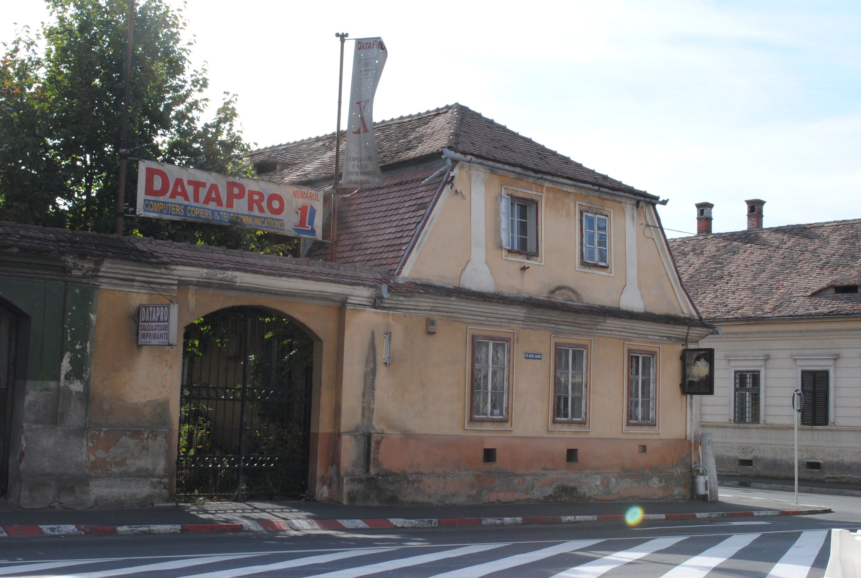 Str. Andrei Șaguna 25